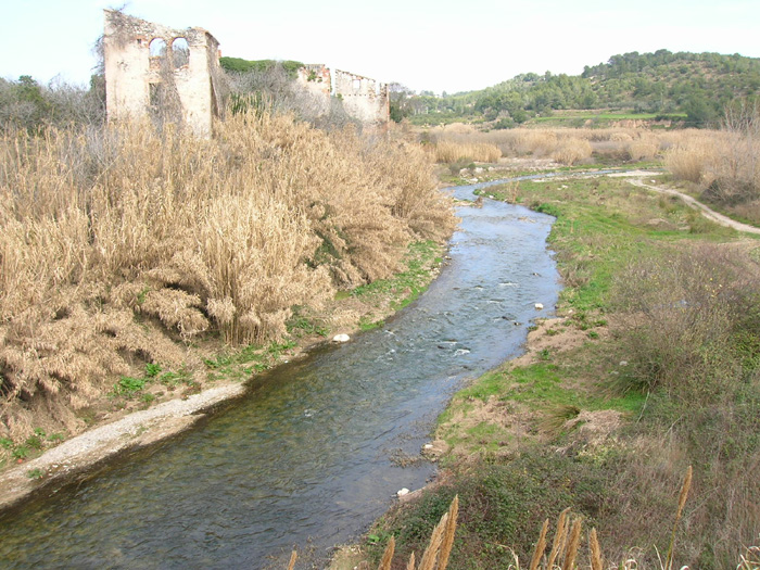 El Francolí.